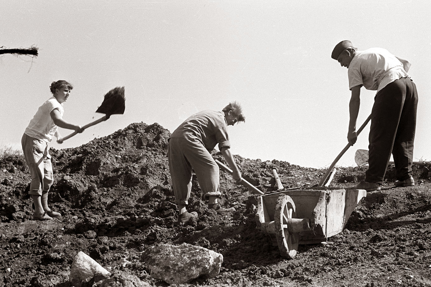 Mladinska delovna brigada Tone Tomšič med gradnjo avtomobilske ceste Ljubljana-Zagreb v Trebnjem na Dolenjskem